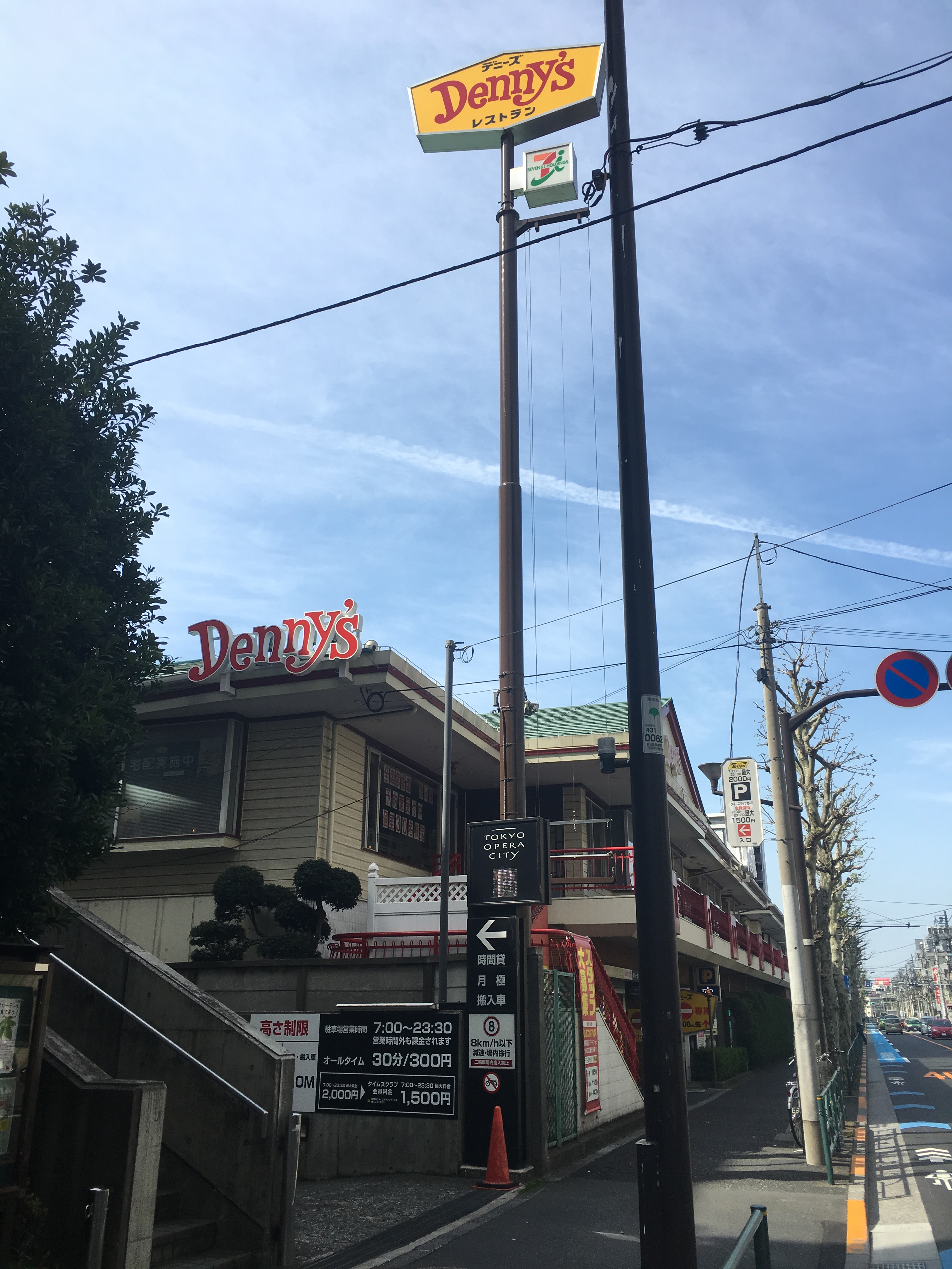 デニーズ西新宿店（2019年4月20日撮影）